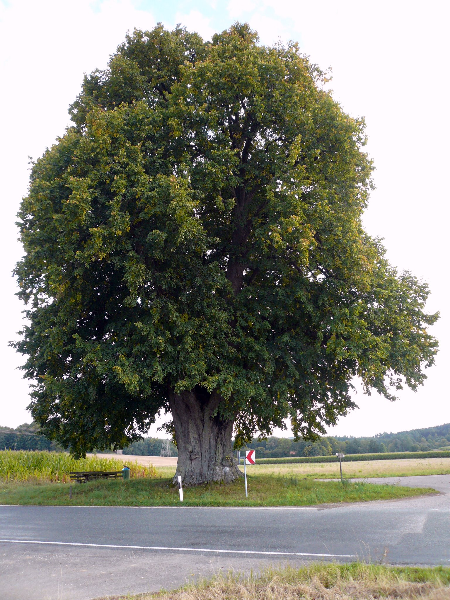 Große Linde bei Teuchatz